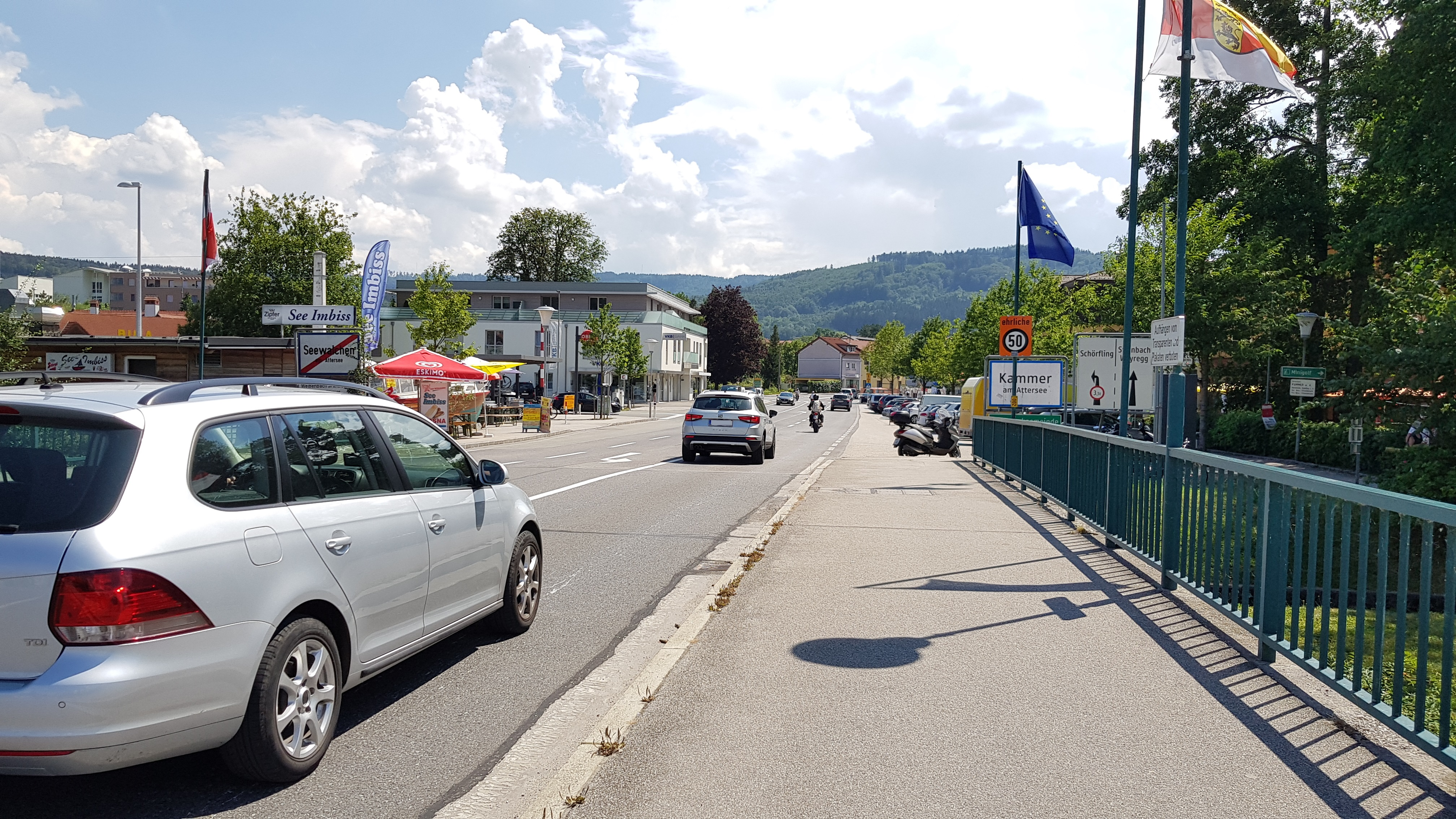 Die Seeleiten Straße, B 152, in Schörfling am Attersee